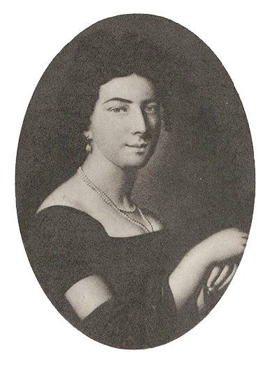 Caroline Kolbe-Ridderstolpe (1793-1878)